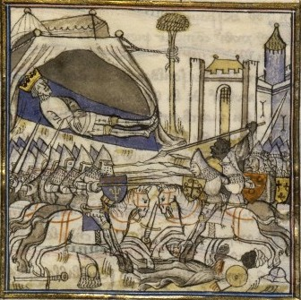 La mort de Saint Louis et la bataille de Tunis (1270)